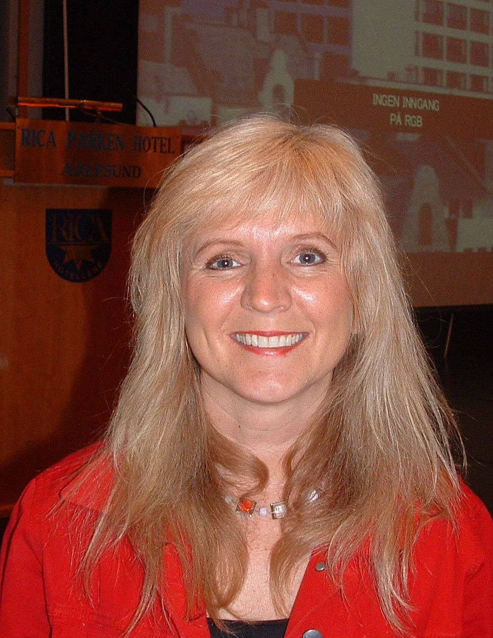 Gunvor Eldegard